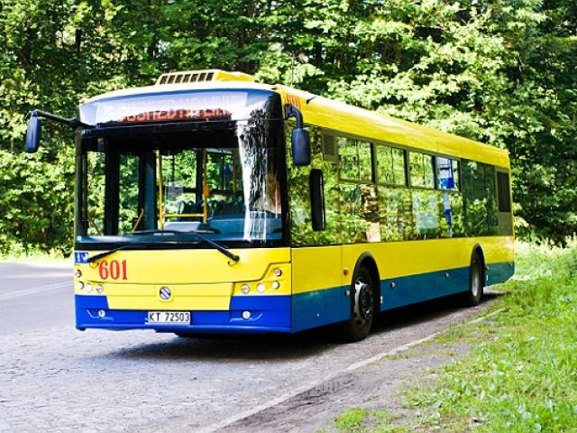 Solbus SM12 MPK Tarnów